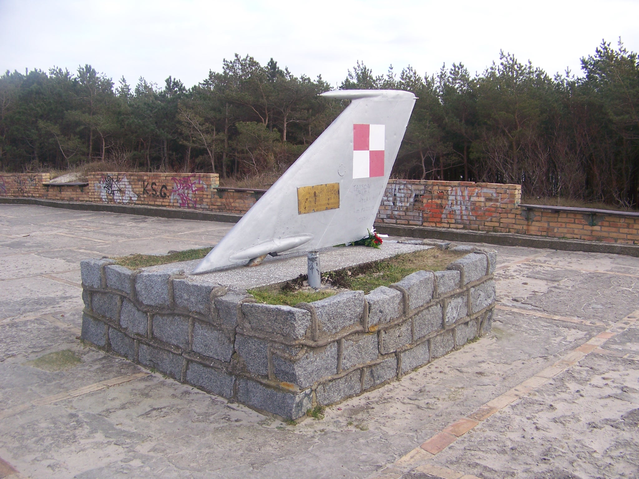 Pomnik lotników w Mielnie